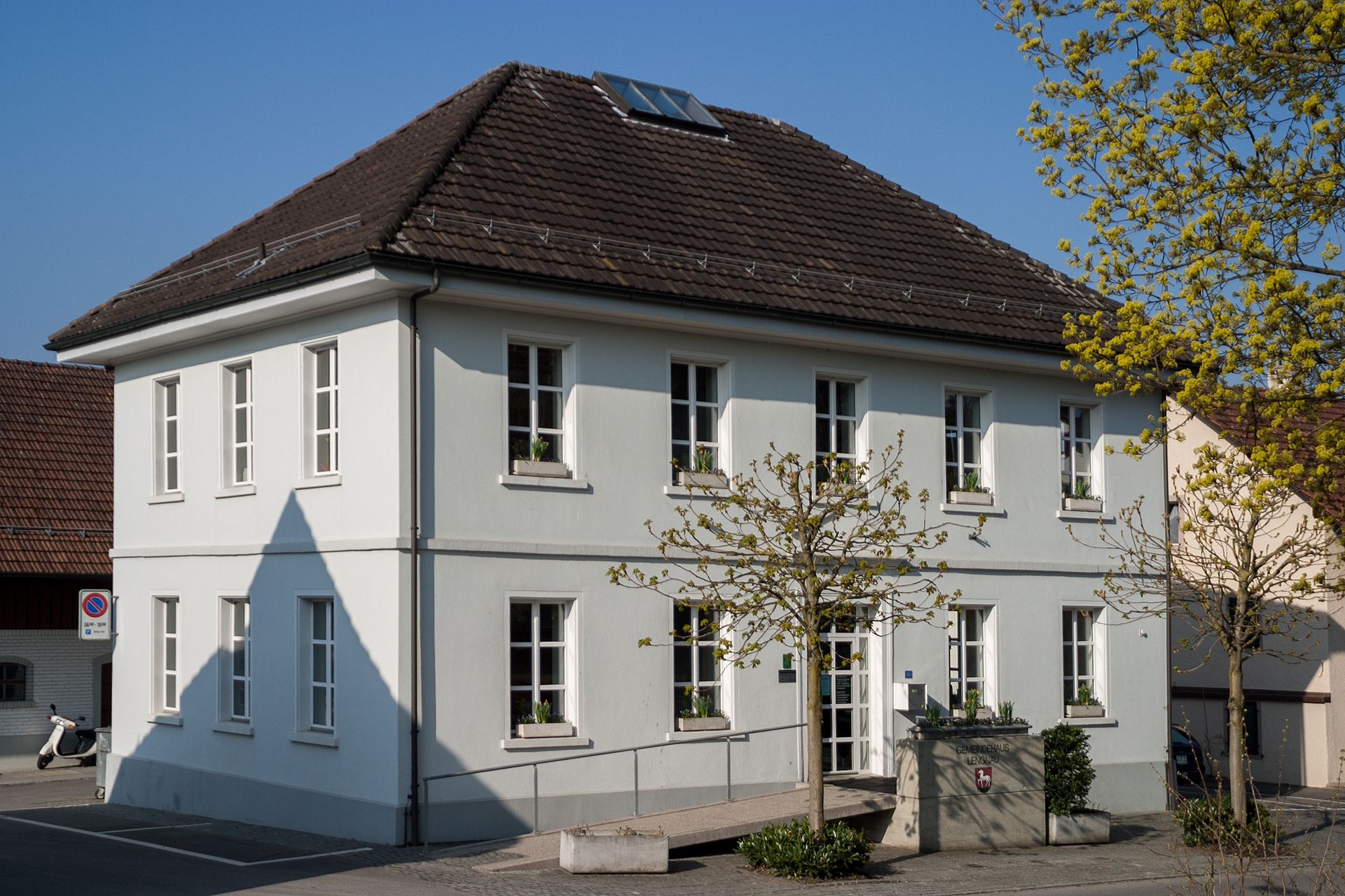 Gemeindehaus (altes Schulhaus) von Lengnau (AG)